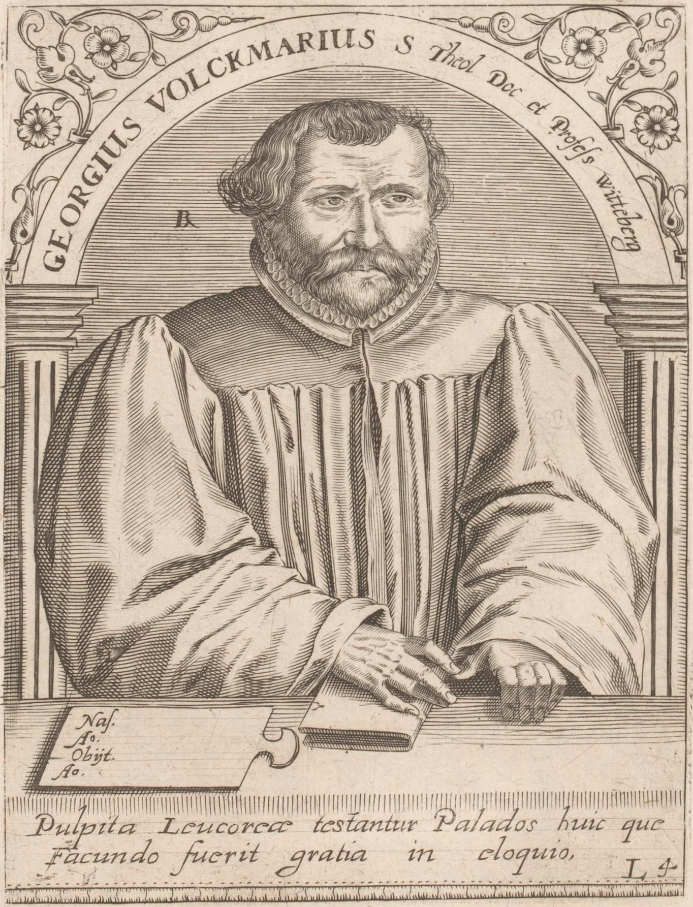 IdentificatieTitel(s): Portret van Johann Georg VolkmarGeorgius Volckmarius S Theol Doc et Profess witteberg (titel op object)Serie portretten van vijftiende- en zestiende-eeuwse geleerden (serietitel)Objecttype: prent Objectnummer: RP-P-1917-930Catalogusreferentie: LeBlanc 196Opschriften / Merken: verzamelaarsmerk, verso, gestempeld: Lugt 2228Omschrijving: Rechtsonder genummerd L4.VervaardigingVervaardiger: prentmaker: Robert Boissard (vermeld op object)Plaats vervaardiging: FrankrijkDatering: 1597 - 1599Materiaal: papier Techniek: graveren (drukprocedé)Afmetingen: plaatrand: h 141 mm × b 107 mmToelichtingMogelijk prent uit: Boissard, Jean-Jacques; Bry, Theodoor de; e.a. Bibliotheca sive thesaurus virtutis et gloriae in quo continentur illustrium eruditione et doctrina virorum effigies et vitae (...). Frankfurt: Guilielmi Fitzeri, 1628.OnderwerpWat: historical personsbookWie: Johann Georg VolkmarVerwerving en rechtenVerwerving: aankoop 1905Copyright: Publiek domein